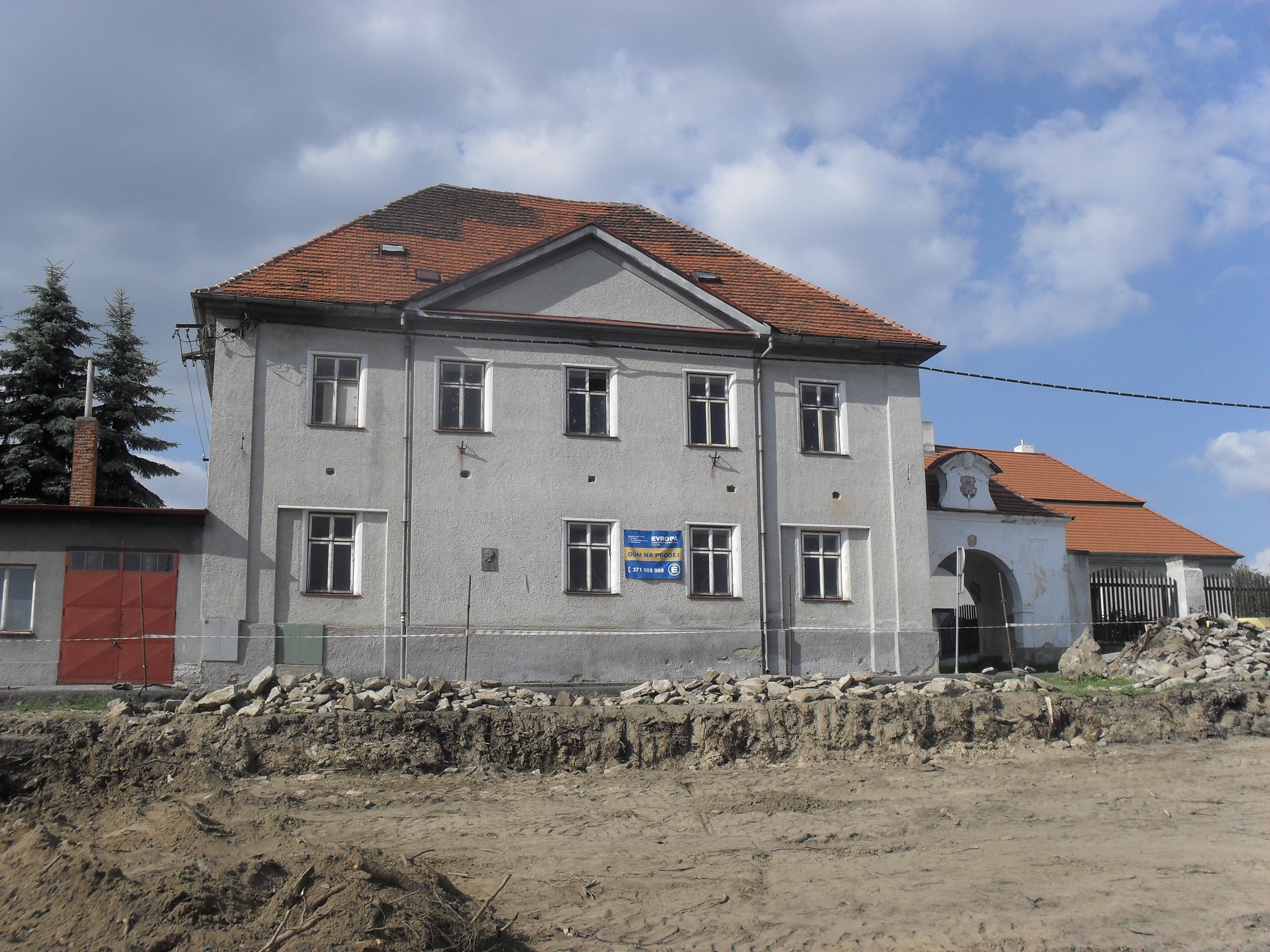 Fotografie Plánického rodného domu Vladimíra Helferta.